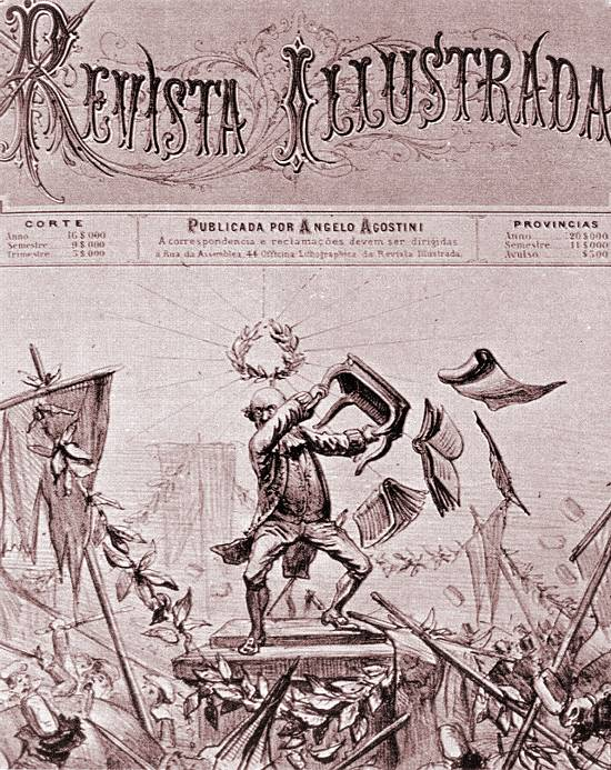 Caricatura de José Bonifácio por Angelo Agostini, com a legenda: "Festejos da Independência. Grande sarilho no Largo de São Francisco na noite de 8 de setembro. O Patriarca Bonifácio, perdendo a paciência, esteve quase disposto a reagir contra os turbulentos".